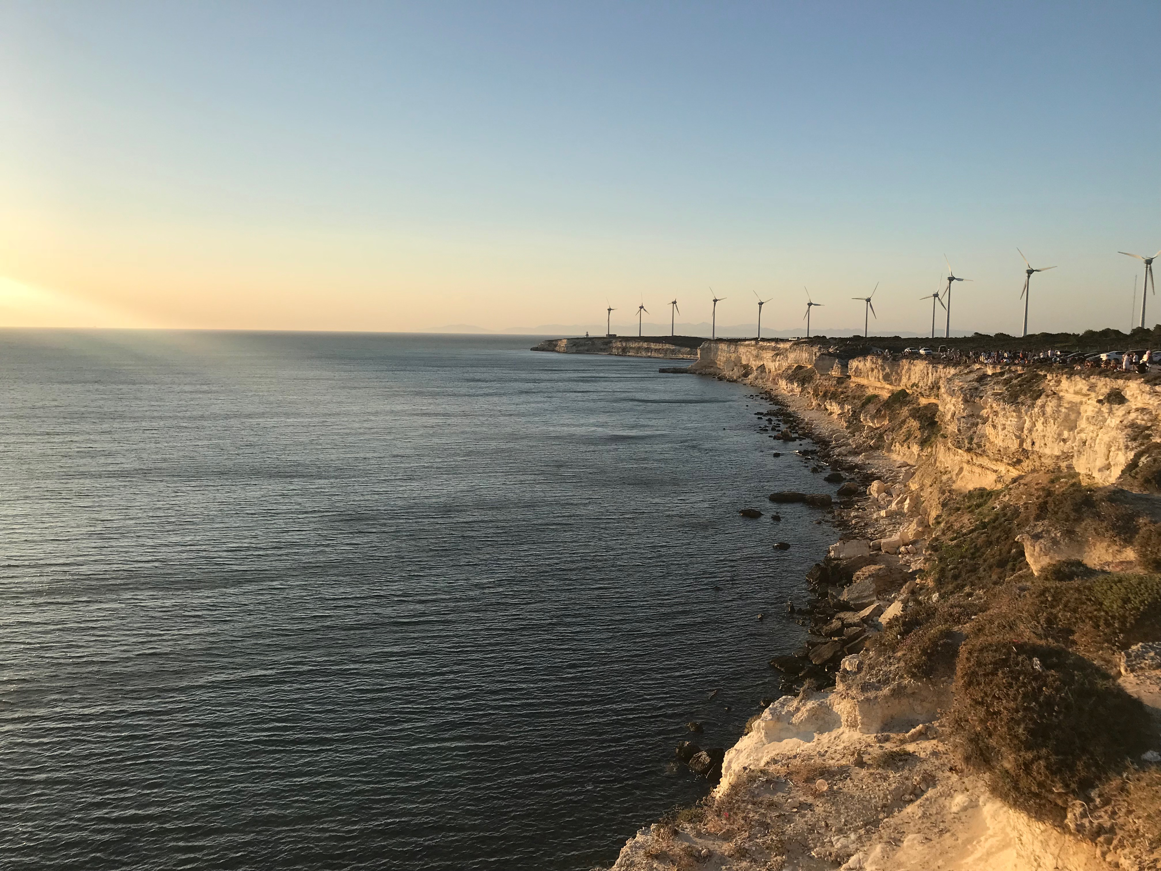 2018 yılı Ağustos ayı Bozcaada